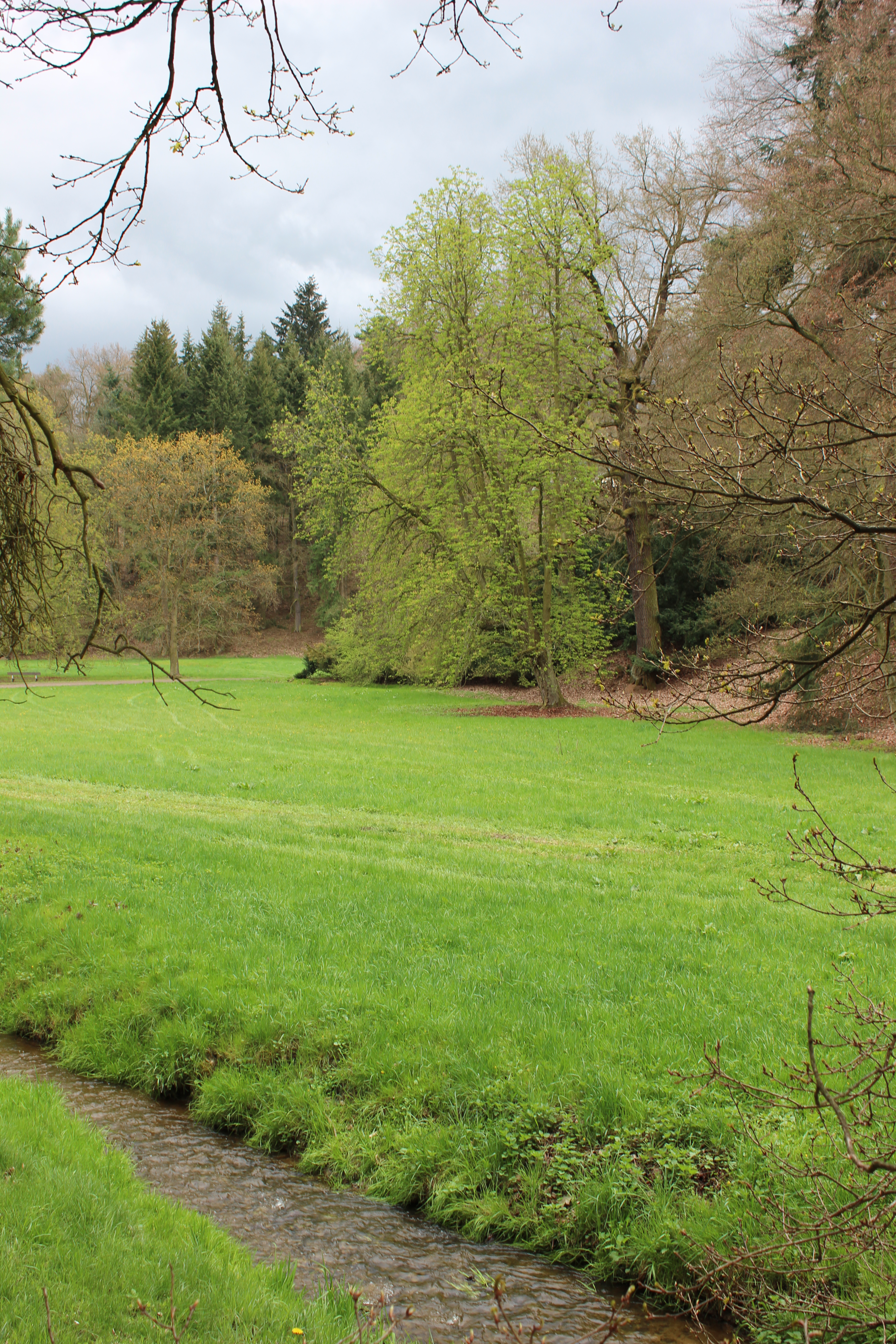 Jesenický potok. Zámecký park Průhonice v okrese Praha-západ ve Středočeském kraji. Česká republika.